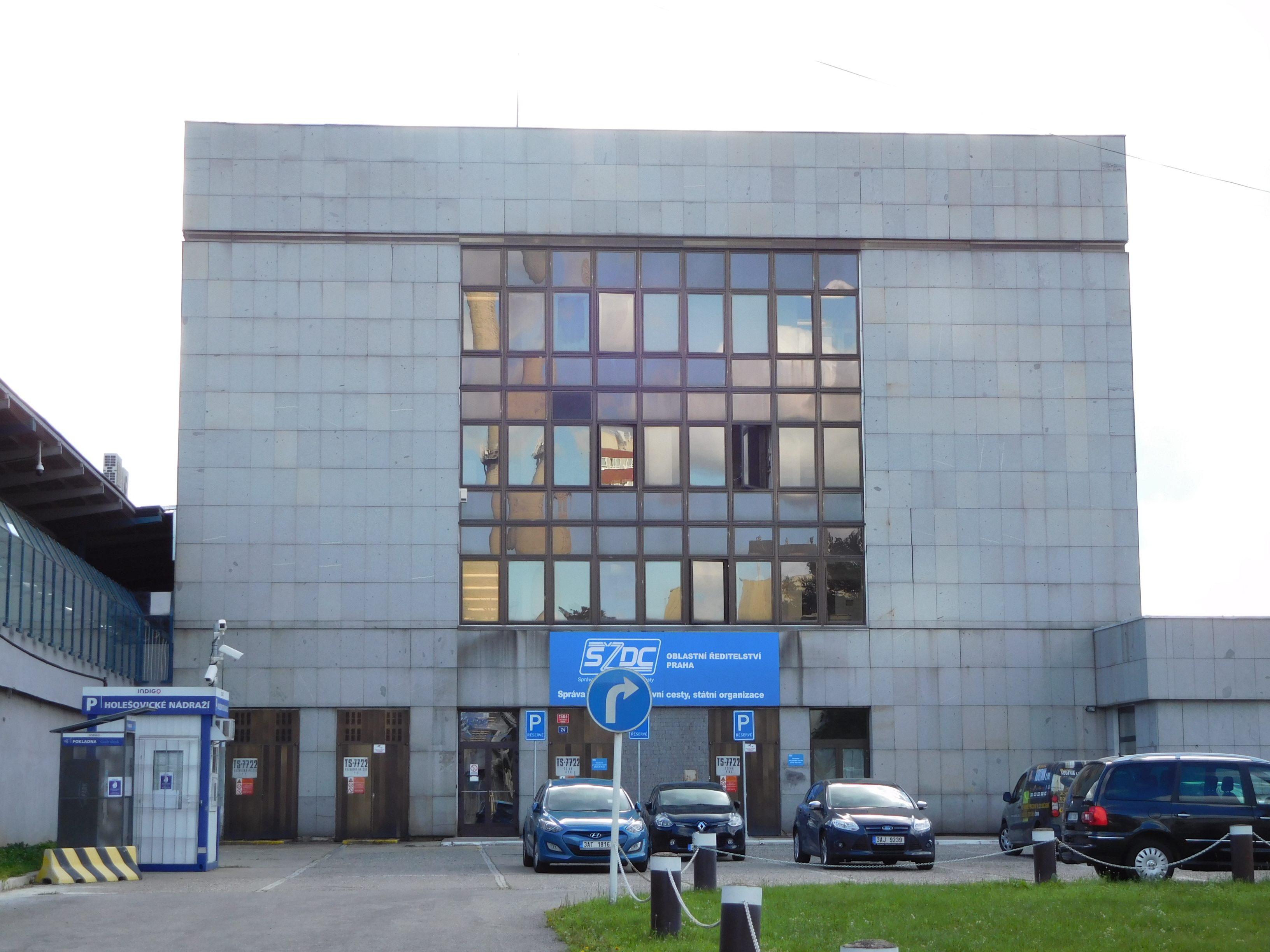 Praha - Holešovice, Partyzánská 24 - SŽDC, Oblastní ředitelství Praha